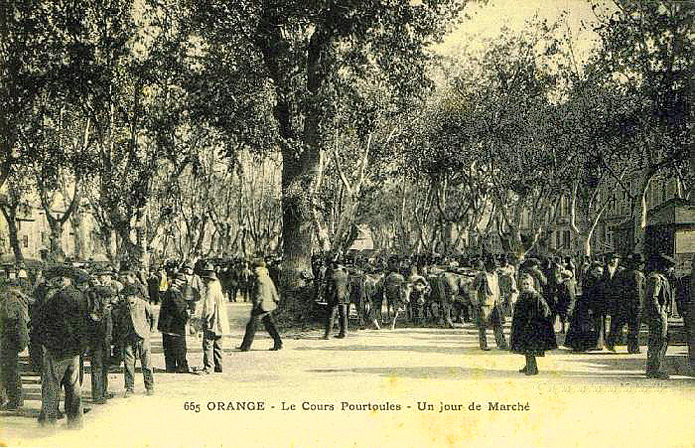 Jour de marché sur le Cours Pourtoules à Orange